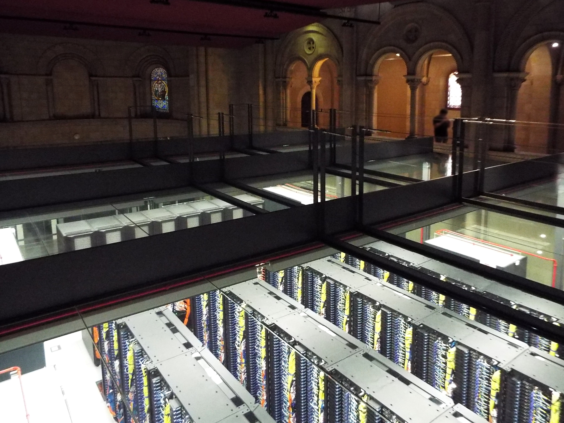 Planta superior del supercomputador MareNostrum III, situado en la antigua capilla junto a la Torre Girona, en el Barcelona Supercomputing Center-Centro Nacional de Supercomputación, España.